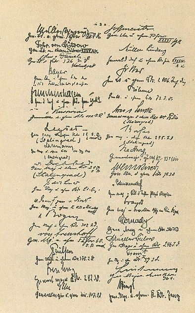 Aufruf der 50. Generale an Volk und Wehrmacht